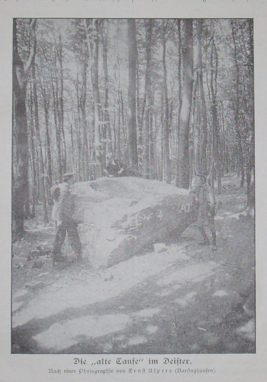 Abbildung der Alten Taufe nach einem Foto von Ernst Alpers. In: Niedersachsen. Halbmonatsschrift für Geschichte, Landes- und Volkskunde, Sprache und Litteratur Niedersachsens. Hg. von August und Friedrich Freudenthal. Jg. 1897/98 (Bremen: Verlag von Carl Schünemann), Heft Nr. 1, S. 5